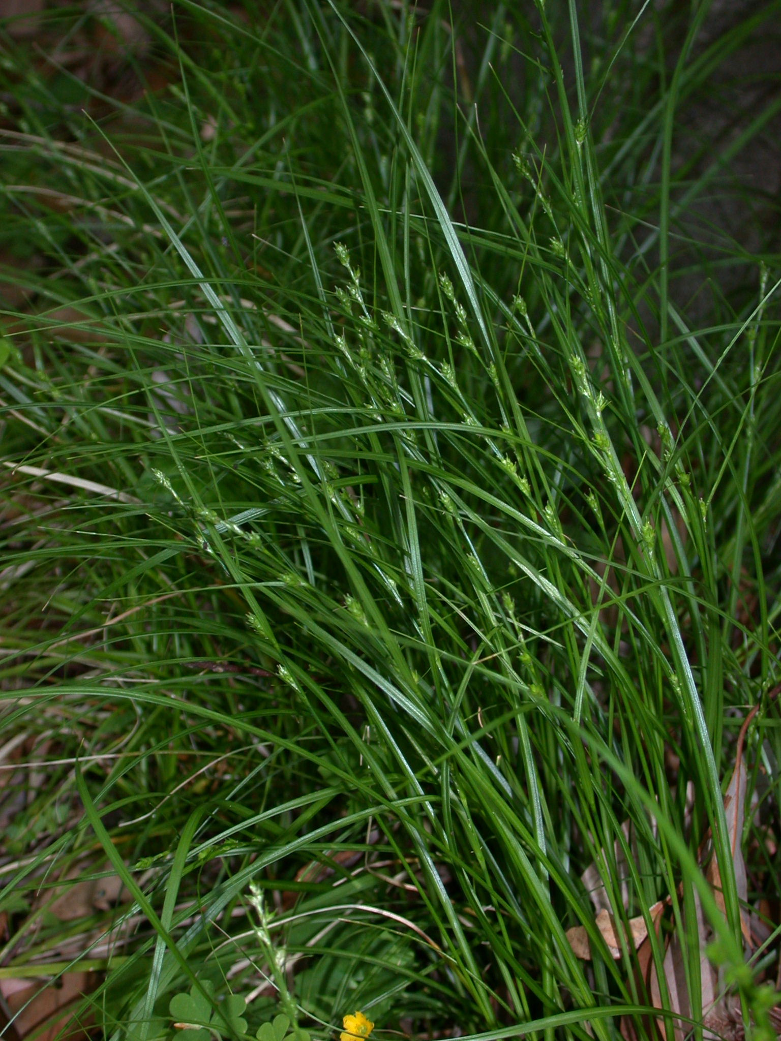 Carex gibba (Cyperaceae) Japanese name;Masukusa date:2007.05.03:Kozagawa town,Wakayama pref.Japan Author;Keisotyo